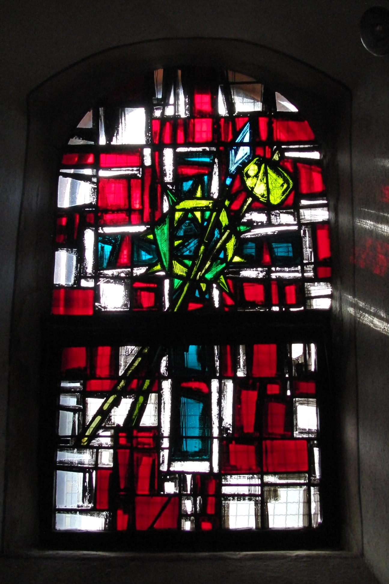 Fenster in der Filialkirche im Ortsteil Hamm, Gemeinde Taben-Rodt, Darstellung der Leidenswerkzeuge Christi